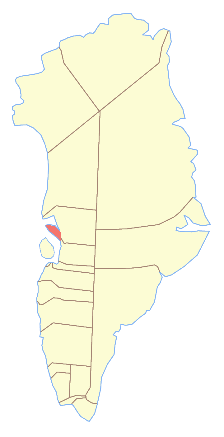 Nuussuaq peninsula in Greenland